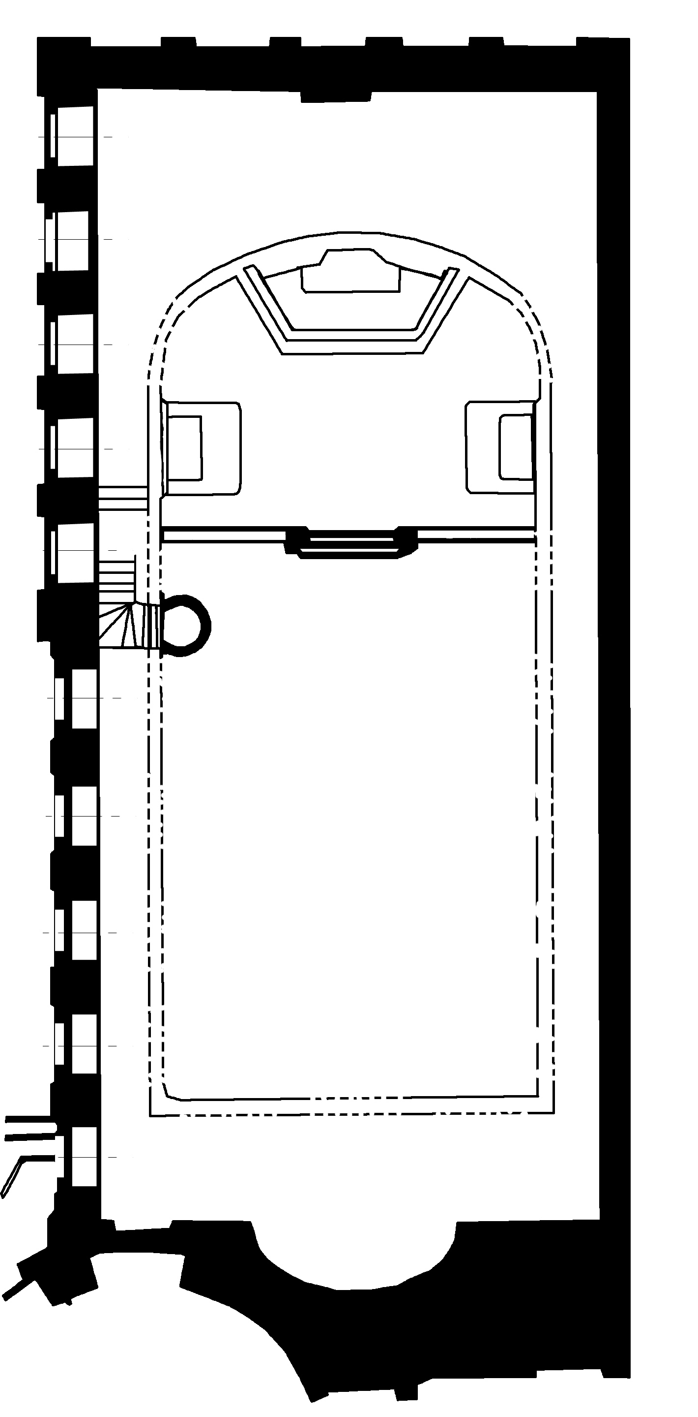 Grundriss Schloßkapelle Hubertusburg ohne Gestühl Hubertusburg